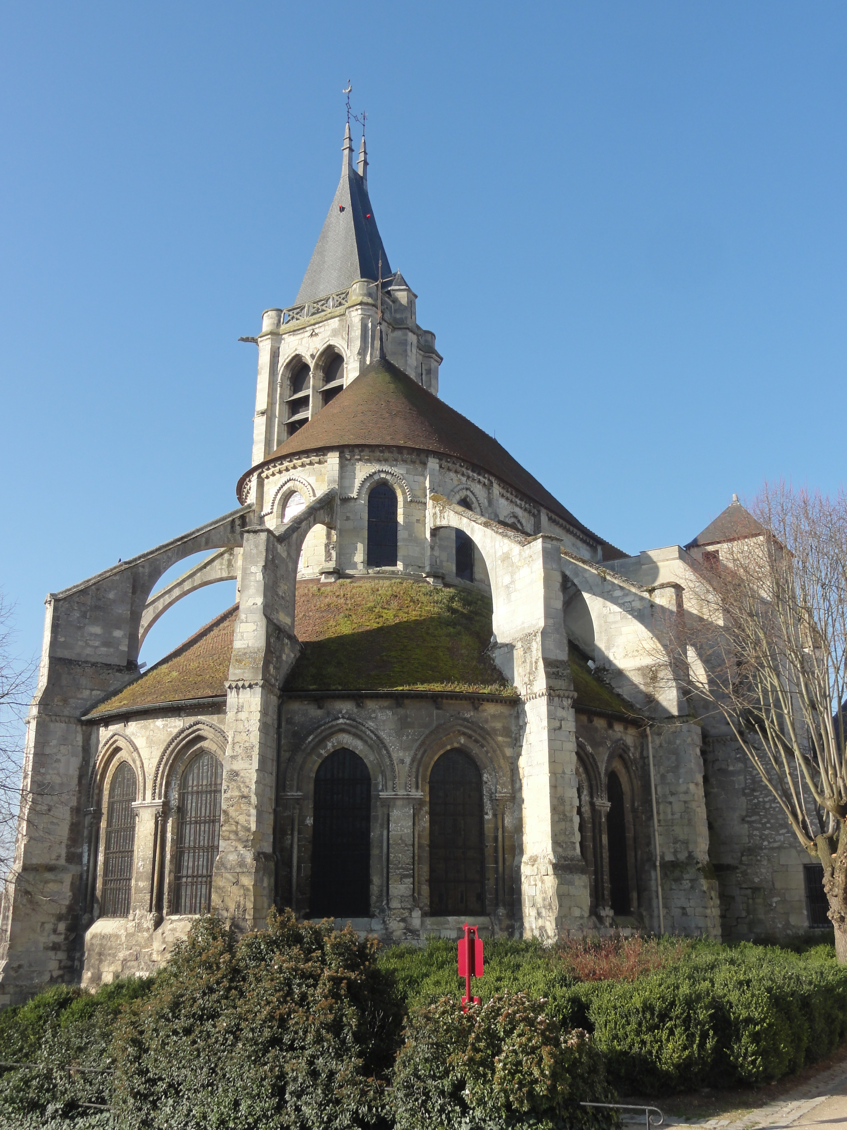 Église Saint-Pierre-Saint-Paul de Gonesse - voir titre.